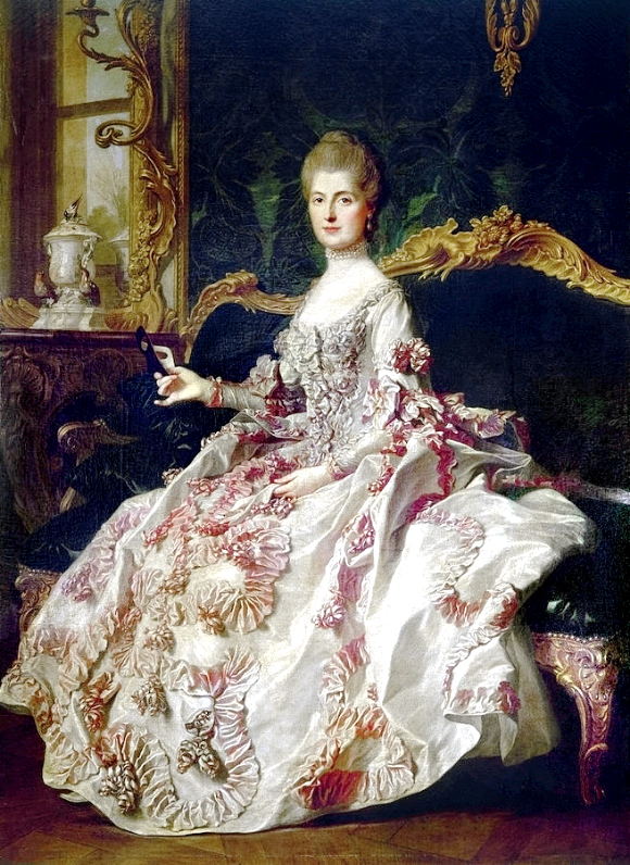 Portrait of Anne-Catherine de Ligniville, Madame Helvétius (1722-1800)